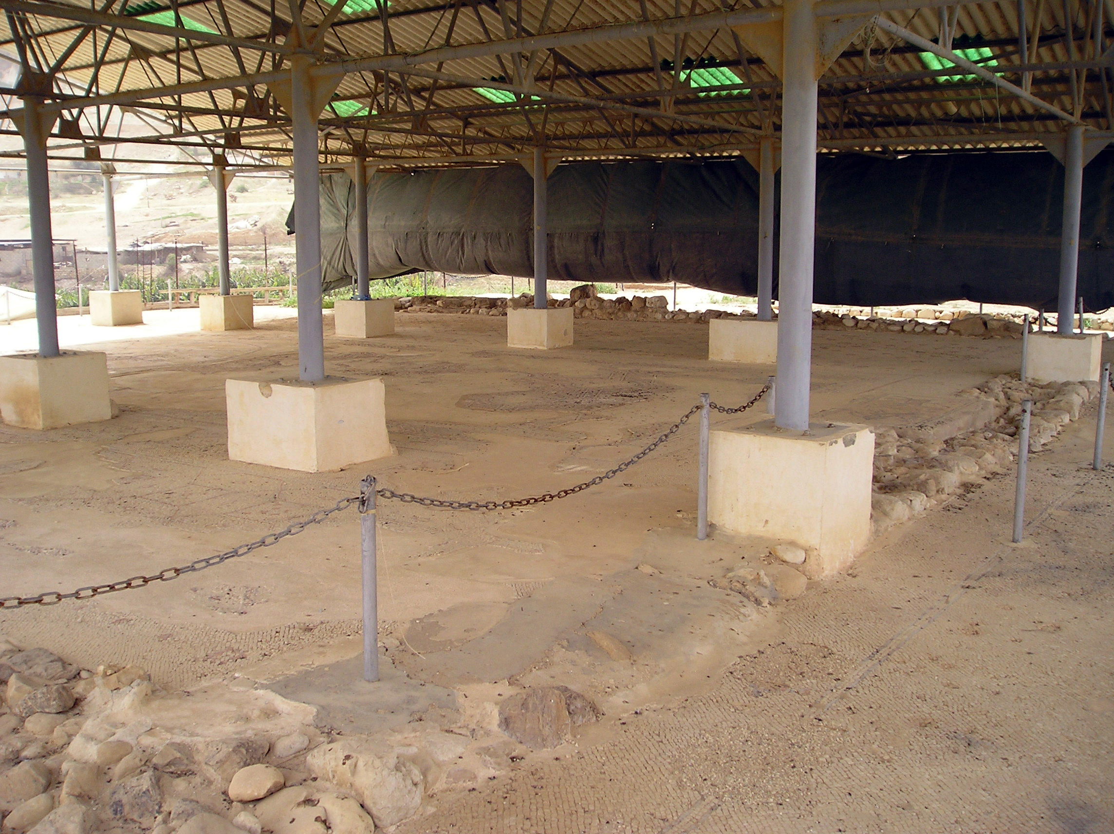 Pozostałości synagogi Naaran w Jerychu (Autonomia Palestyńska). Zdjęcie wykonał A. Sobkowski dn. 9 marca 2006.